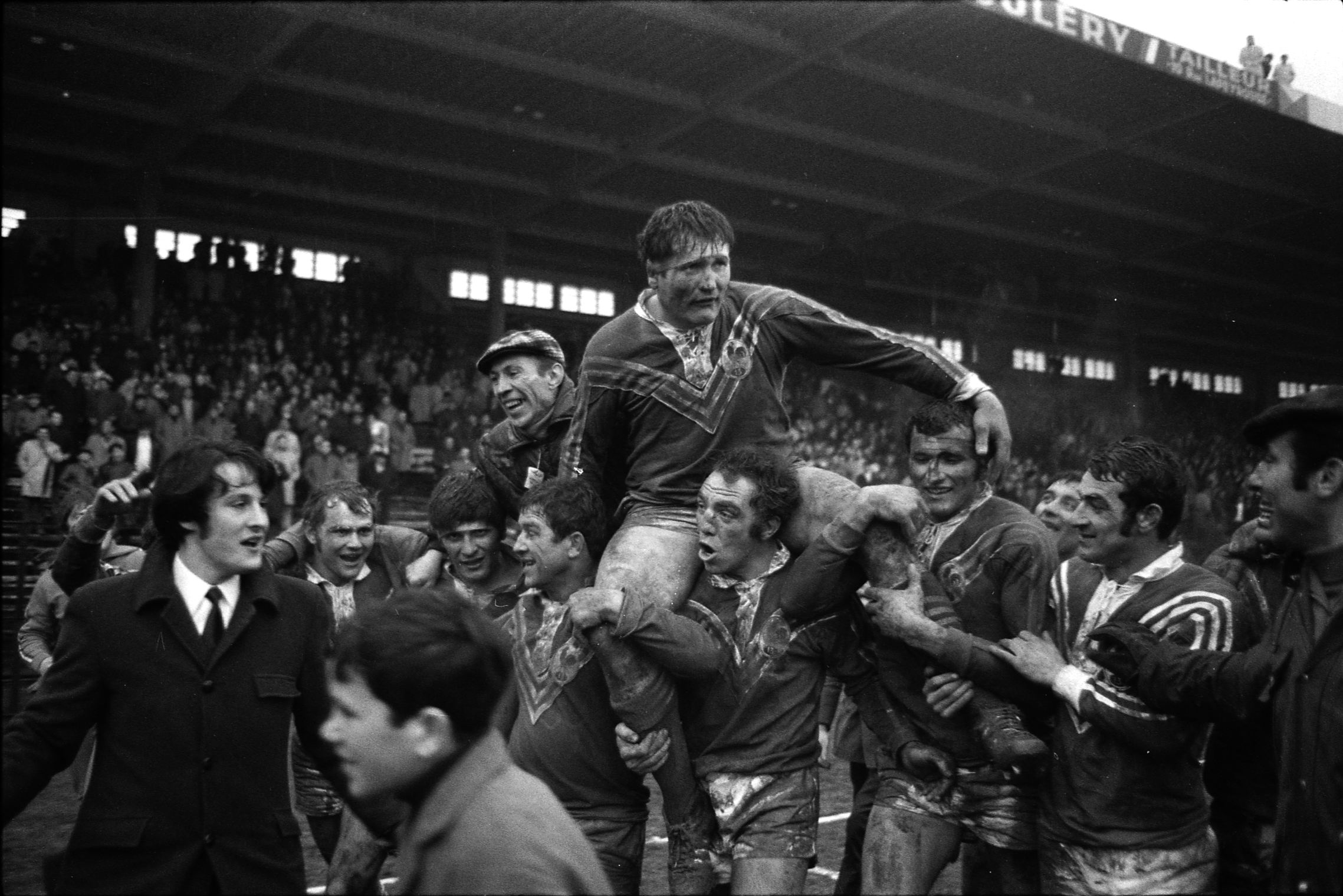 15 mars 1970. Au 1er plan le joueur toulousain Georges Aillières porté en triomphe sur les épaules de ses coéquipiers (plan 3/4, vue de face) lors d'un match France-Angleterre ; en arrière-plan gradins avec spectateurs.